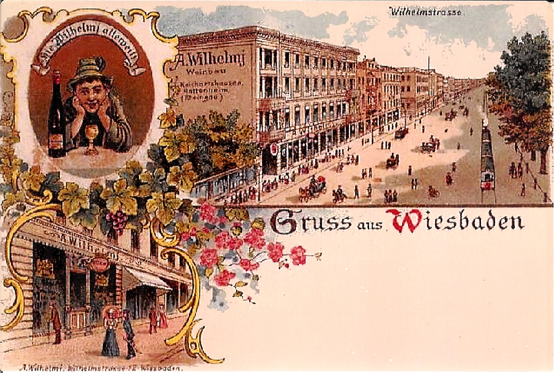 Ehemaliges Geschäftshaus der August Wilhelmj Weinhandel-Gesellschaft (ab 1885). Wilhelmstr. 18, Wiesbaden